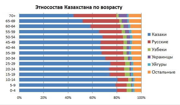 Возрастная структура этносостава Казахстана на начало 2013 г.